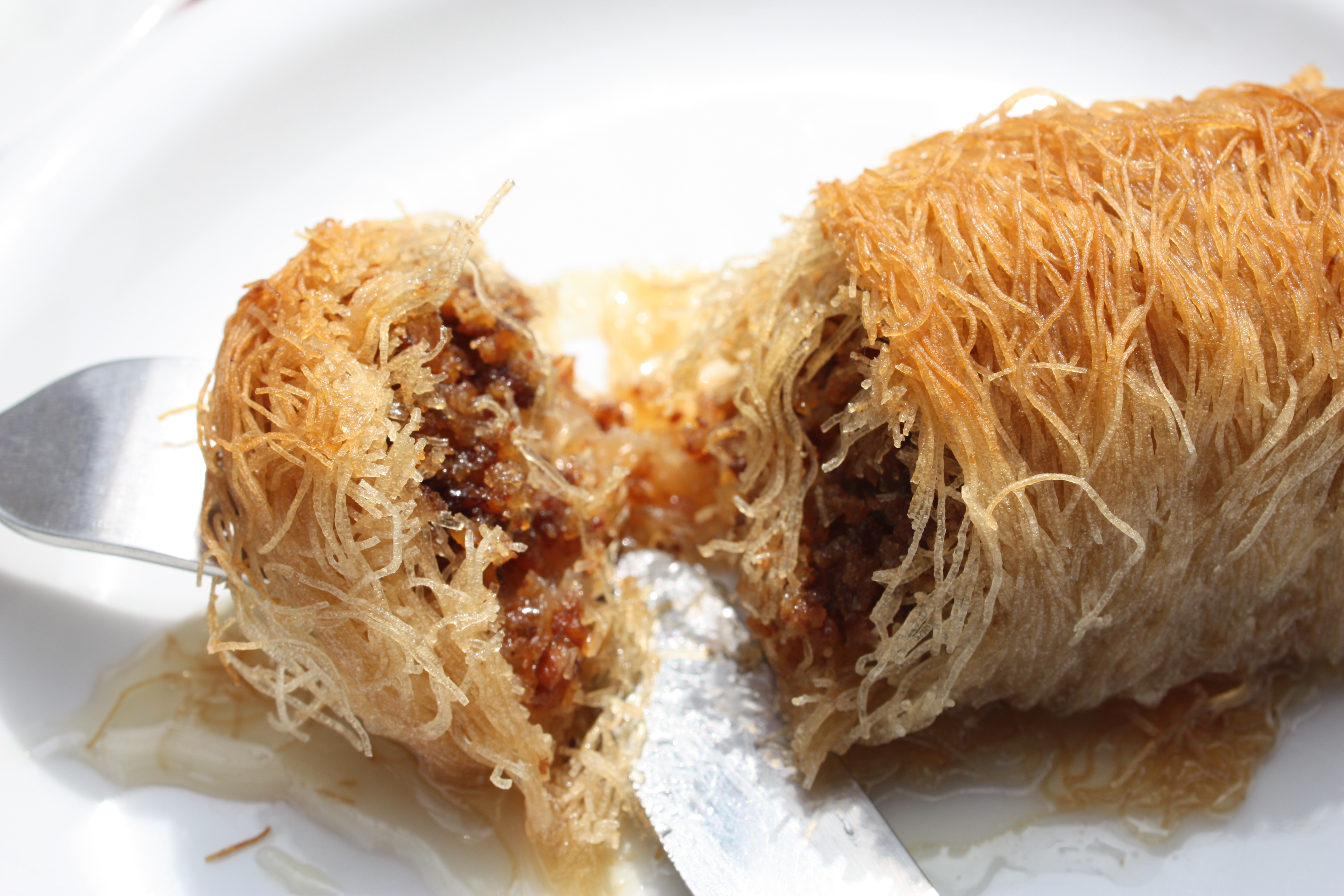 Kadaif in Sofia, Bulgaria